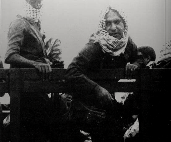 عز الدين المناصرة - حصار بيروت